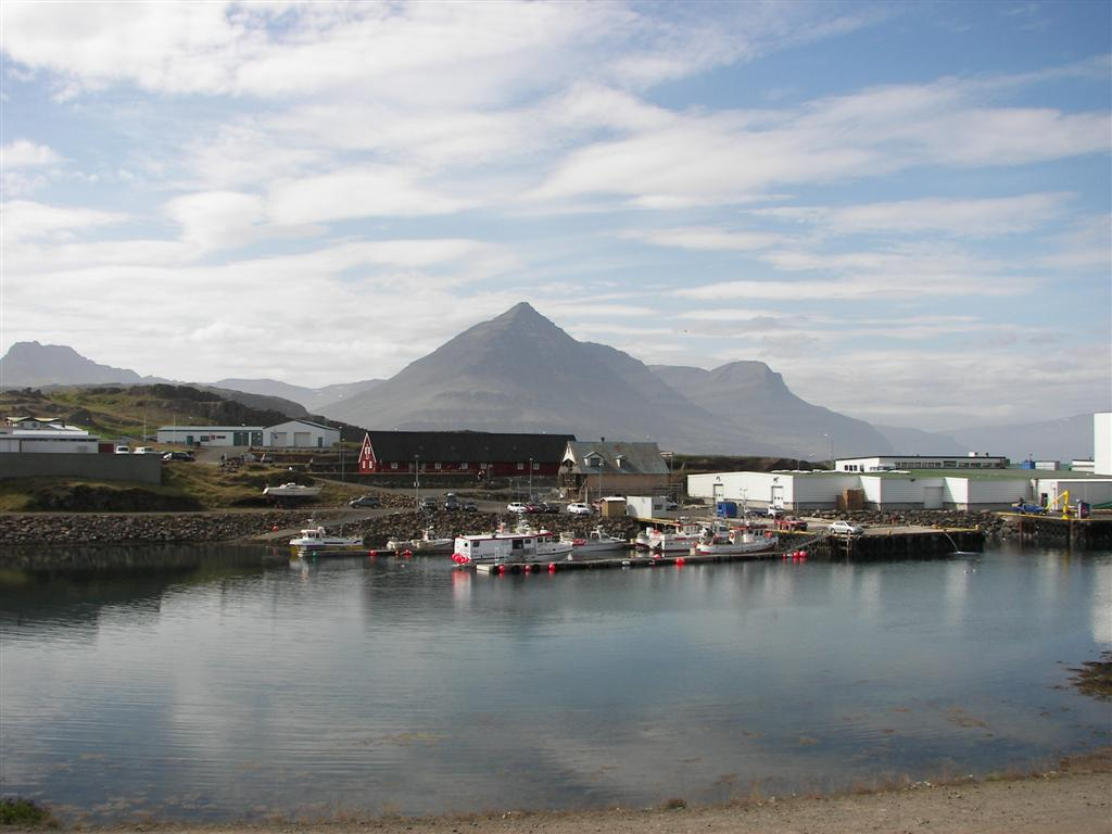 Djúpivogur á Austurlandi & Mountain Búlandstindur